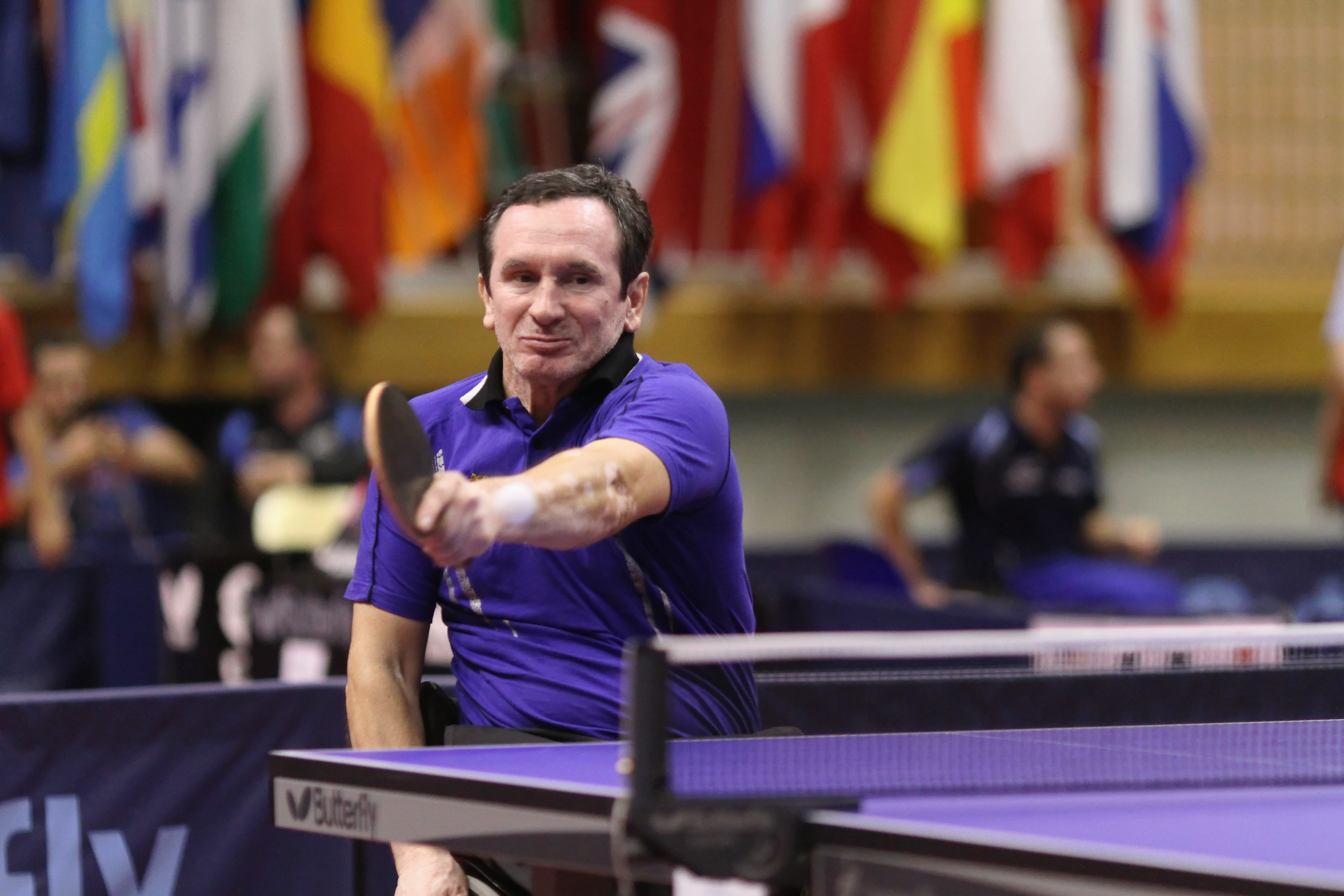 KESLER Zlatko (SRB) IMG_2957_DxO